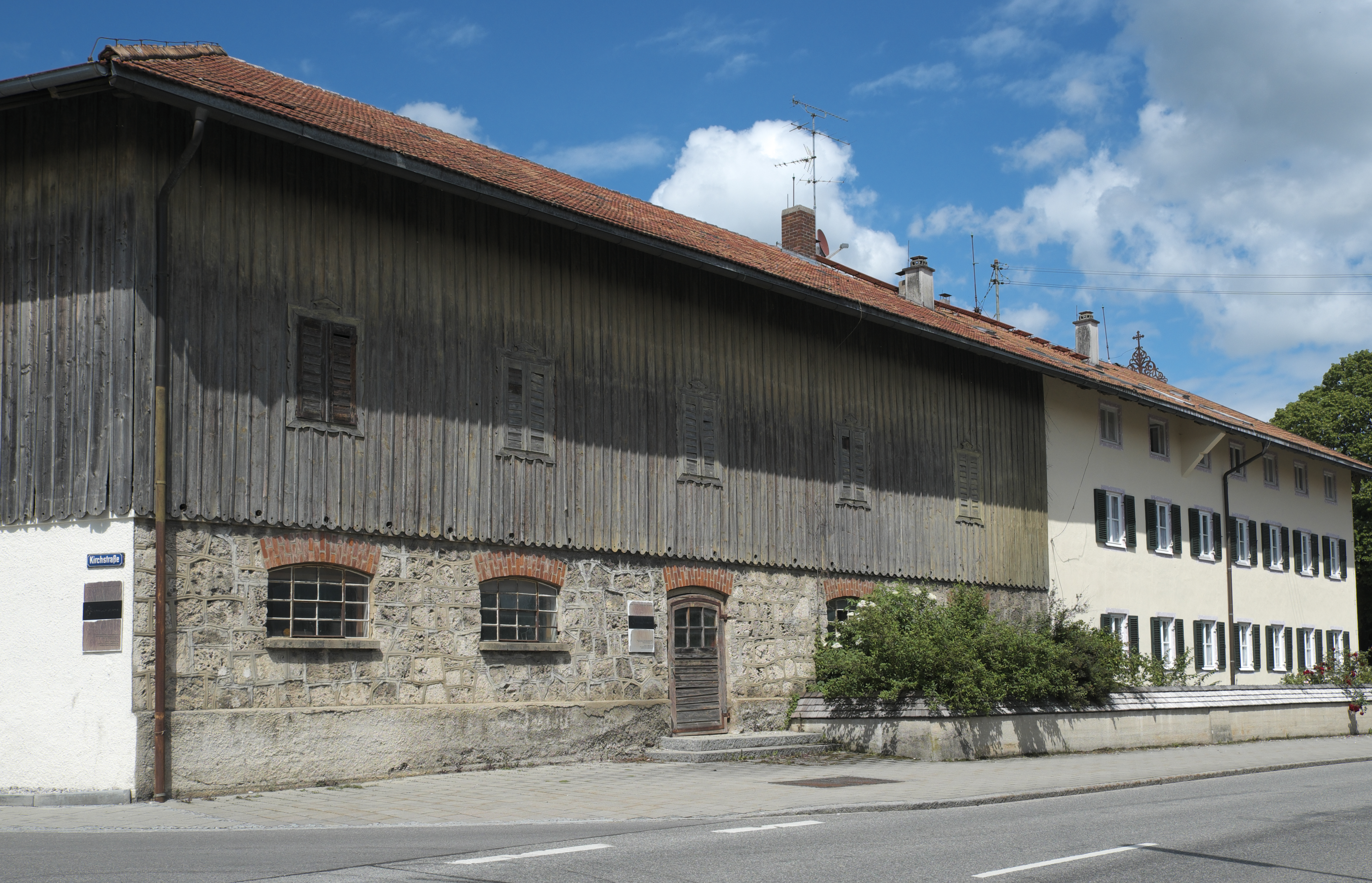 Bauernhaus Beim Lindmaier in der Wolfratshausener Straße 12 in Sauerlach im Landkreis München (Bayern/Deutschland), Stall